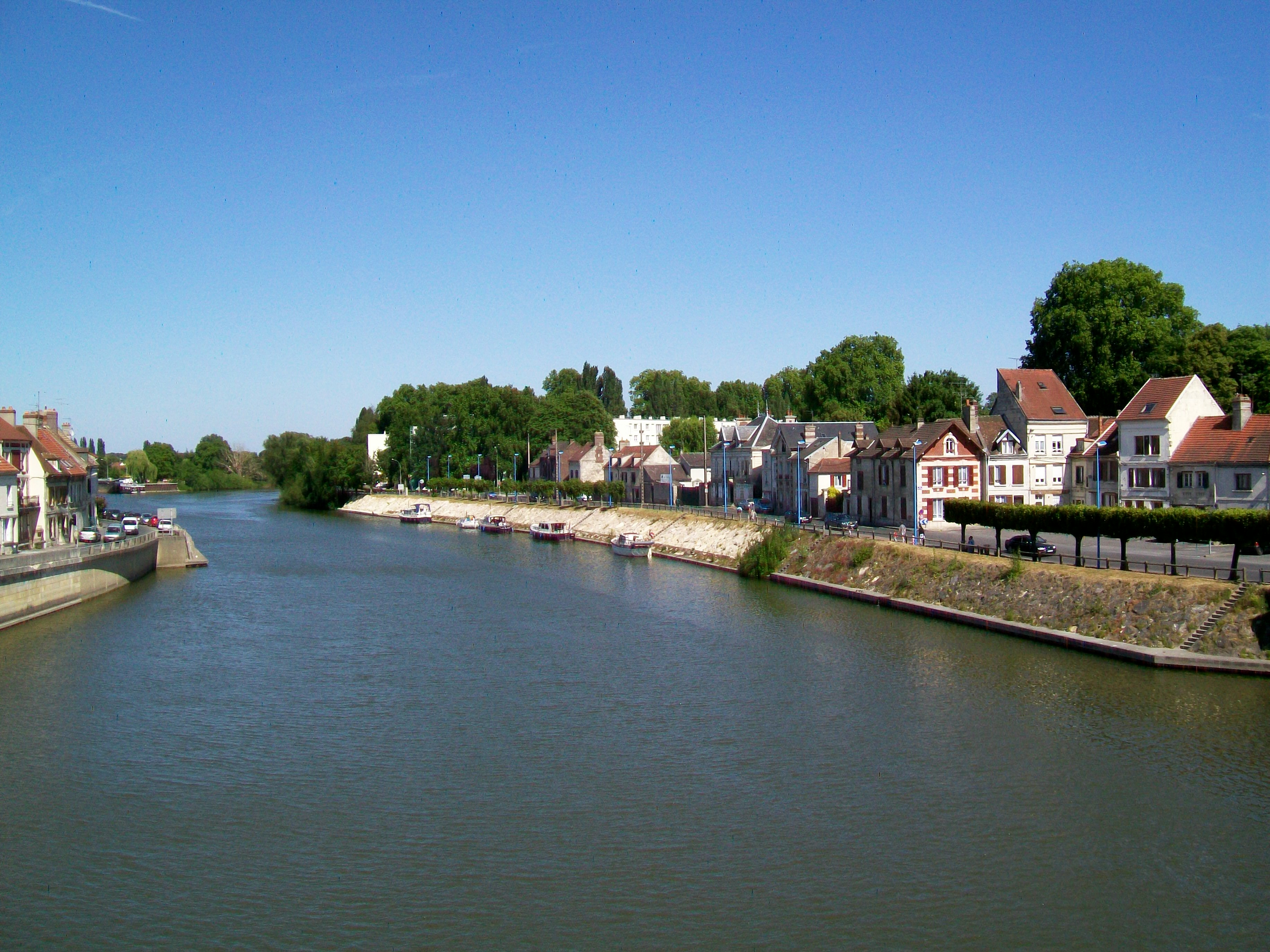 L'Oise à Pont-Sainte-Maxence, vue depuis le pont en direction de l'est.